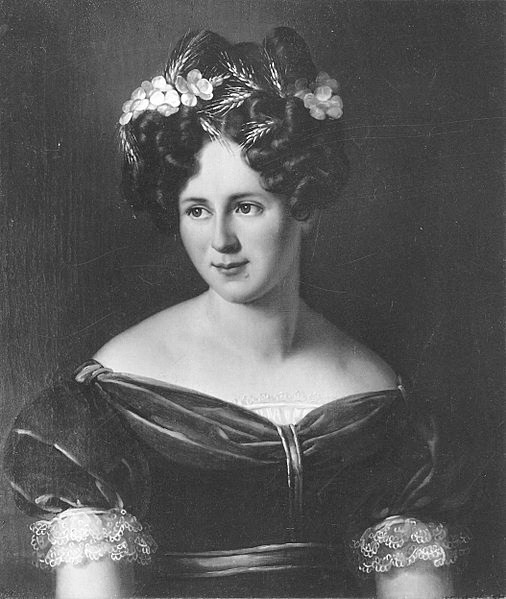 Графиня Александра Сергеевна Панина, урождённая Толстая (1800-1875).